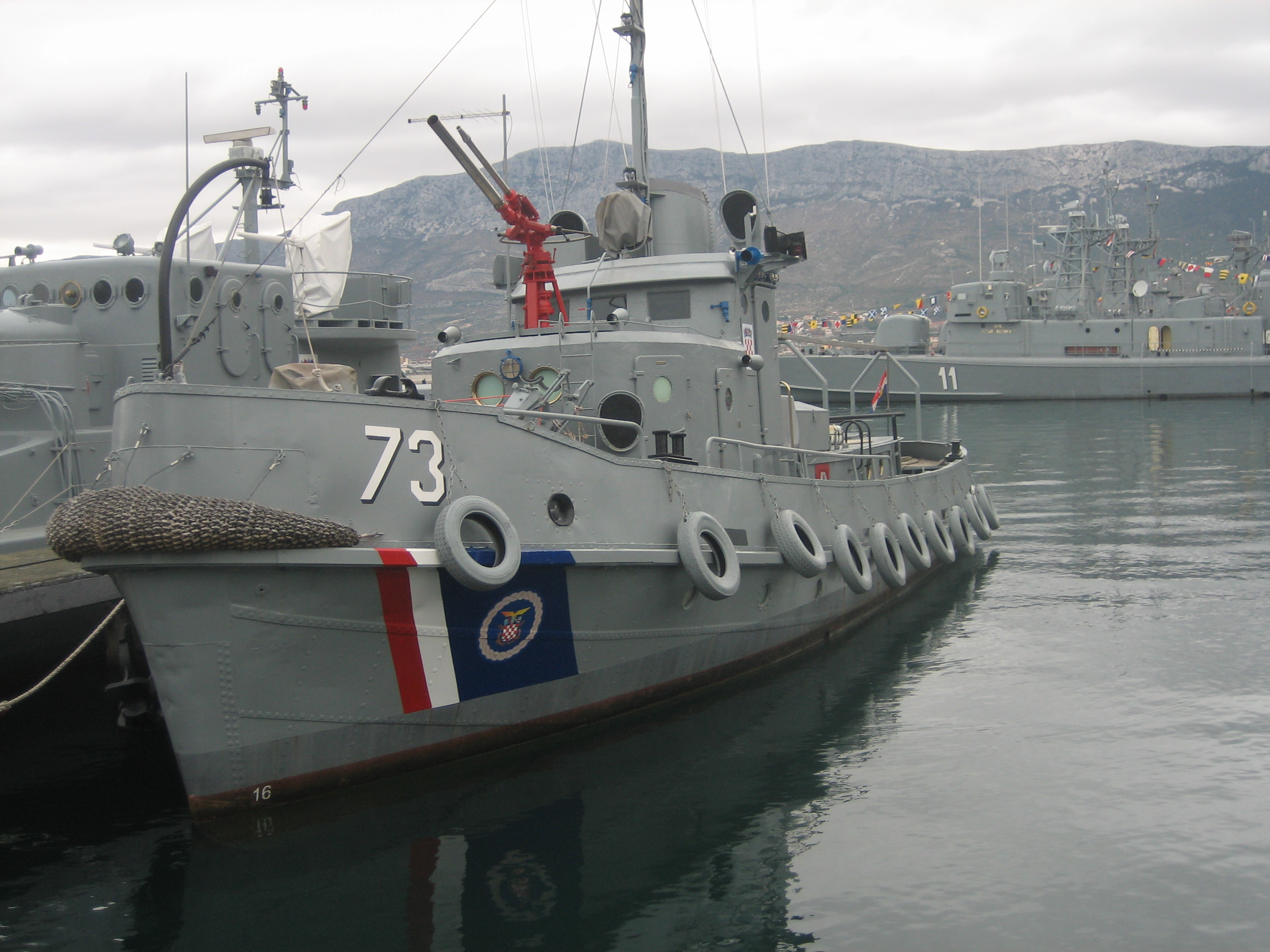 Lučki remorker LR-73